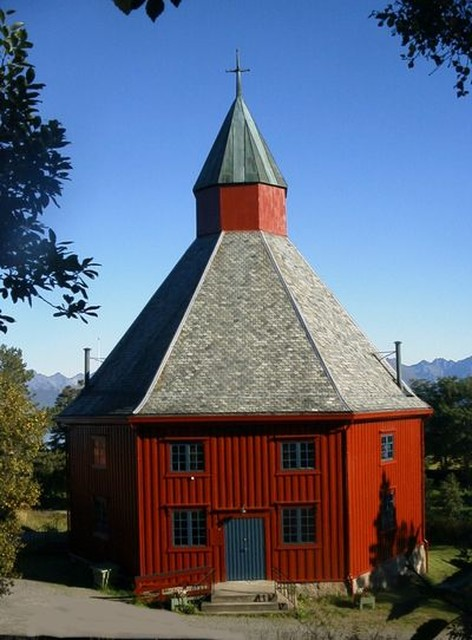 Hadsel kirke i Hadsel